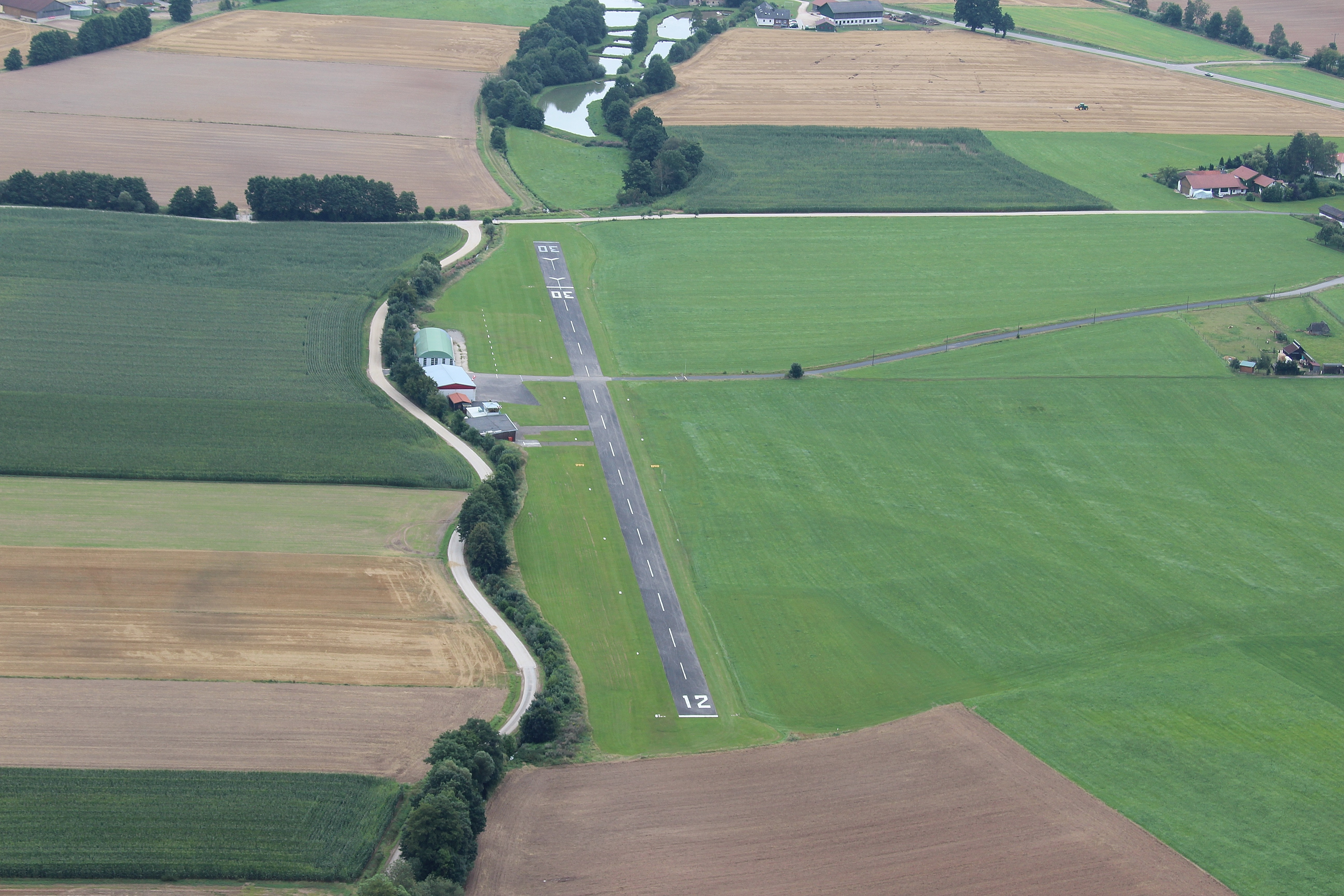 Landeplatz Schmidgaden: Landkreis Schwandorf, Oberpfalz, Bayern